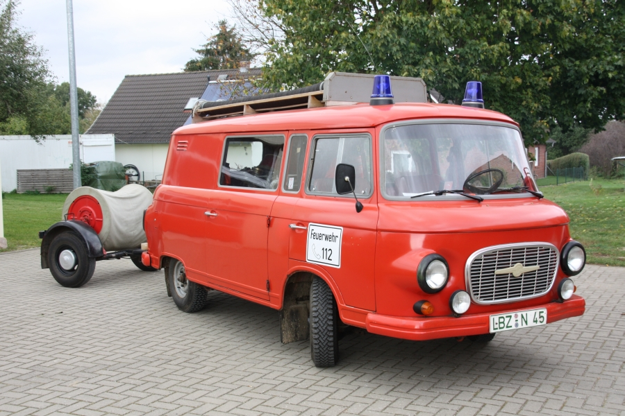 KLF-TS8 der FFw Barkow mit Schlauchhaspelanhänger HF-KLF